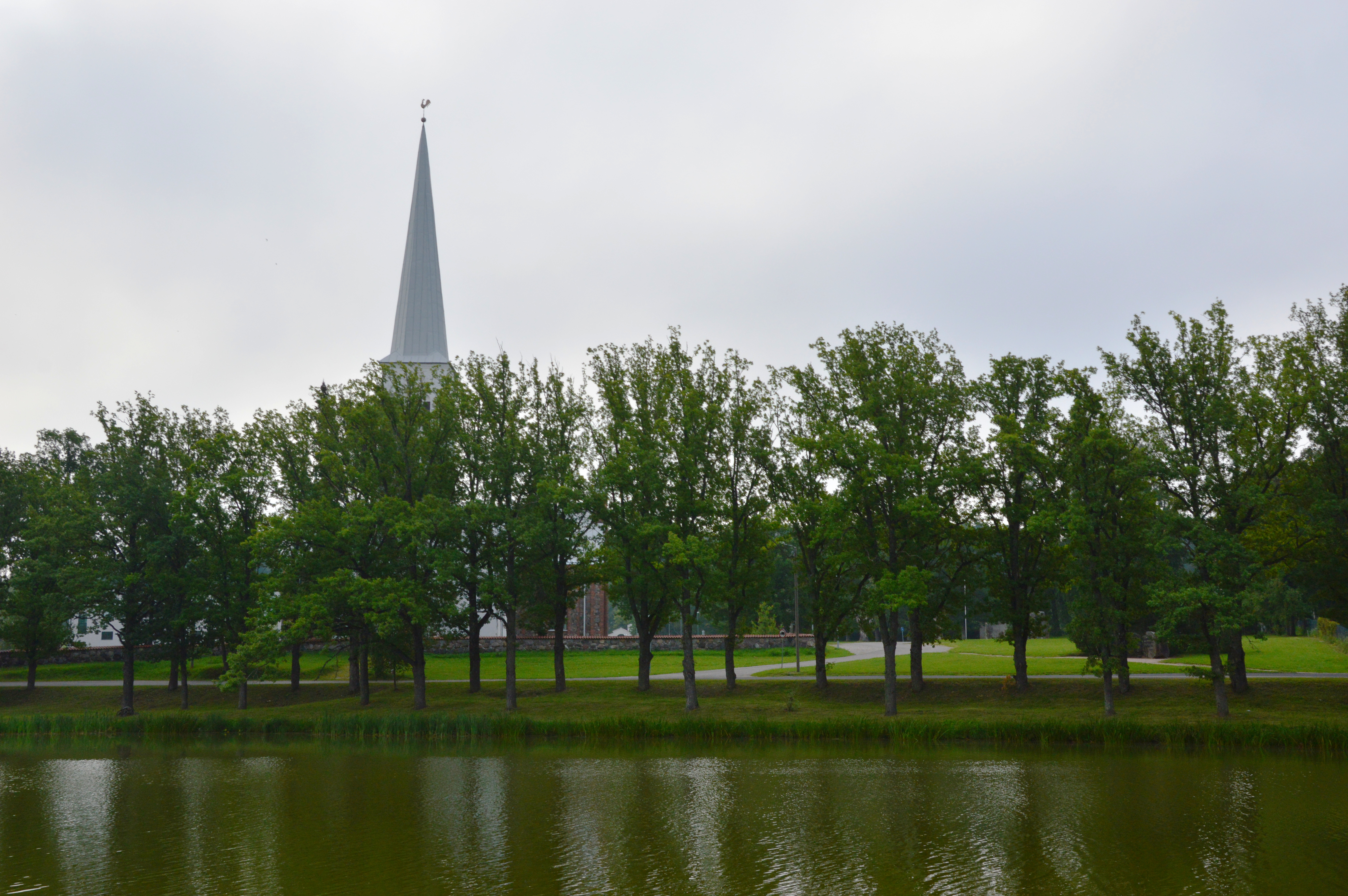 Kambja järv ja Kambja kiriku torn.